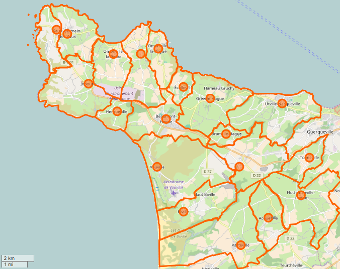 carte de la commune nouvelle de La Hague et de ses communes déléguées